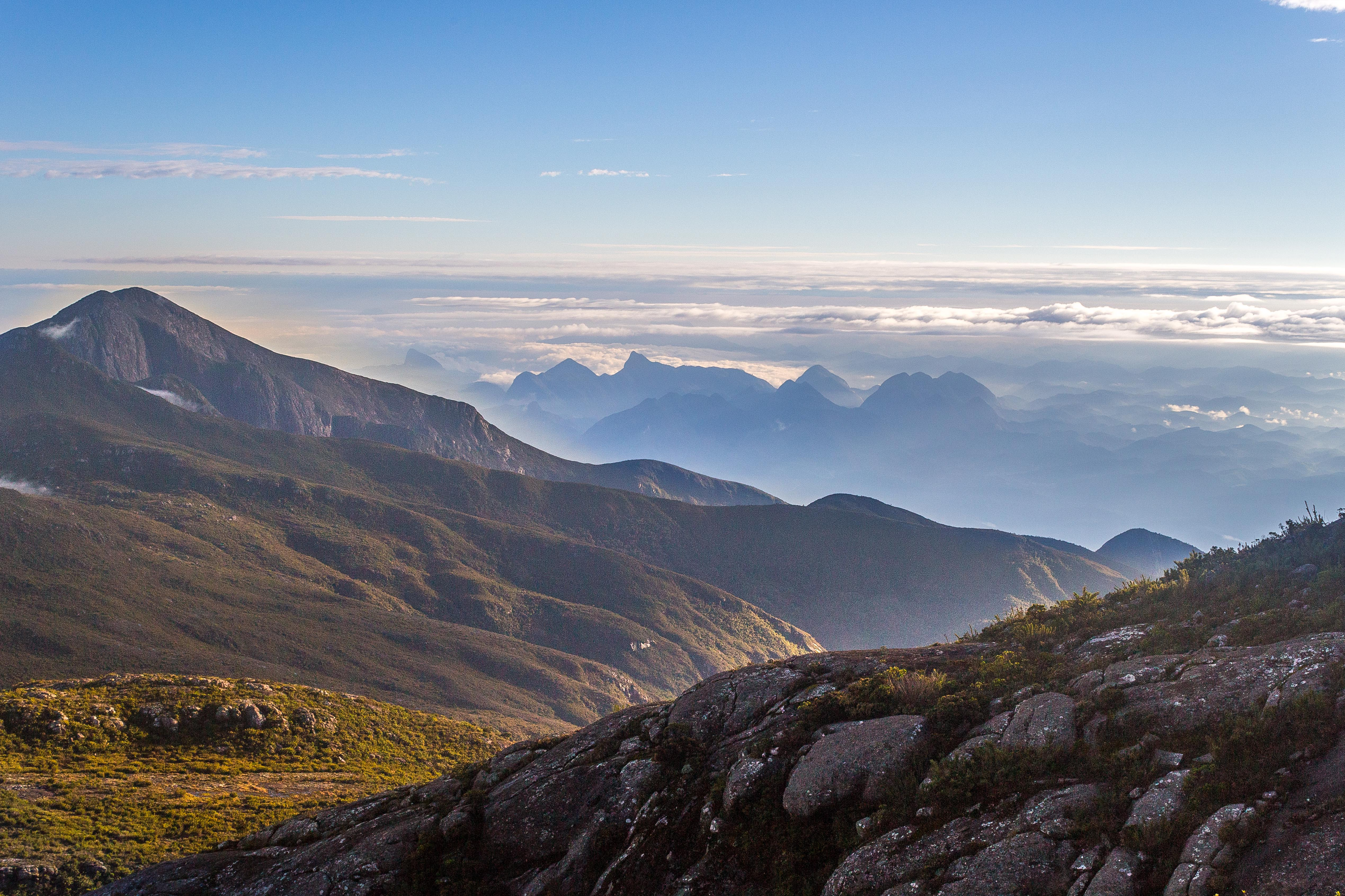 Amanhecer no Pico da Bandeira/MG